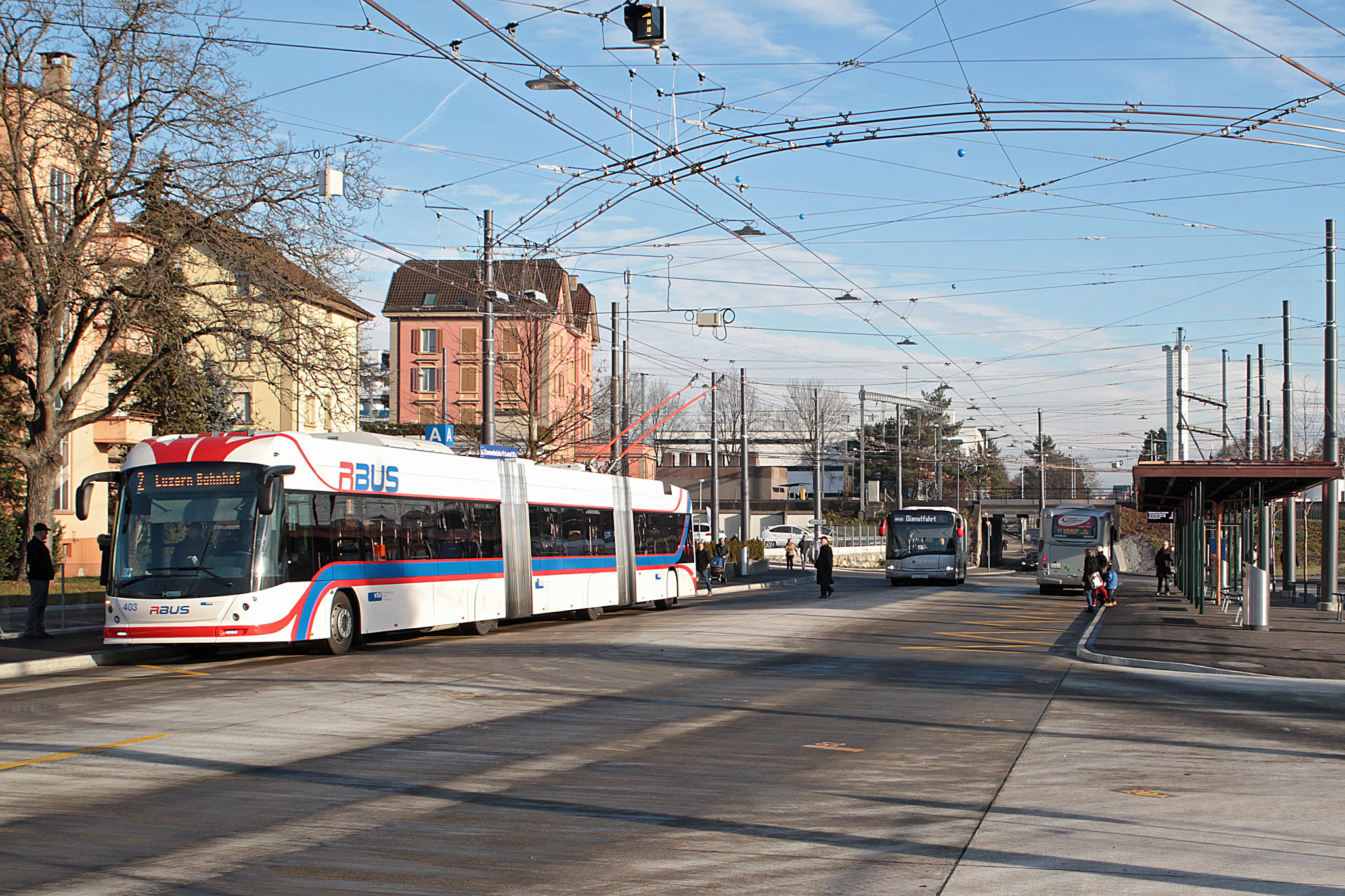 Hess/Vossloh-Kiepe lighTram 4 Nr. 403 der Verkehrsbetriebe Luzern beim Busbahnhof Emmenbrücke Bahnhof Süd, zusammen mit zwei Bussen der Auto AG Rothenburg